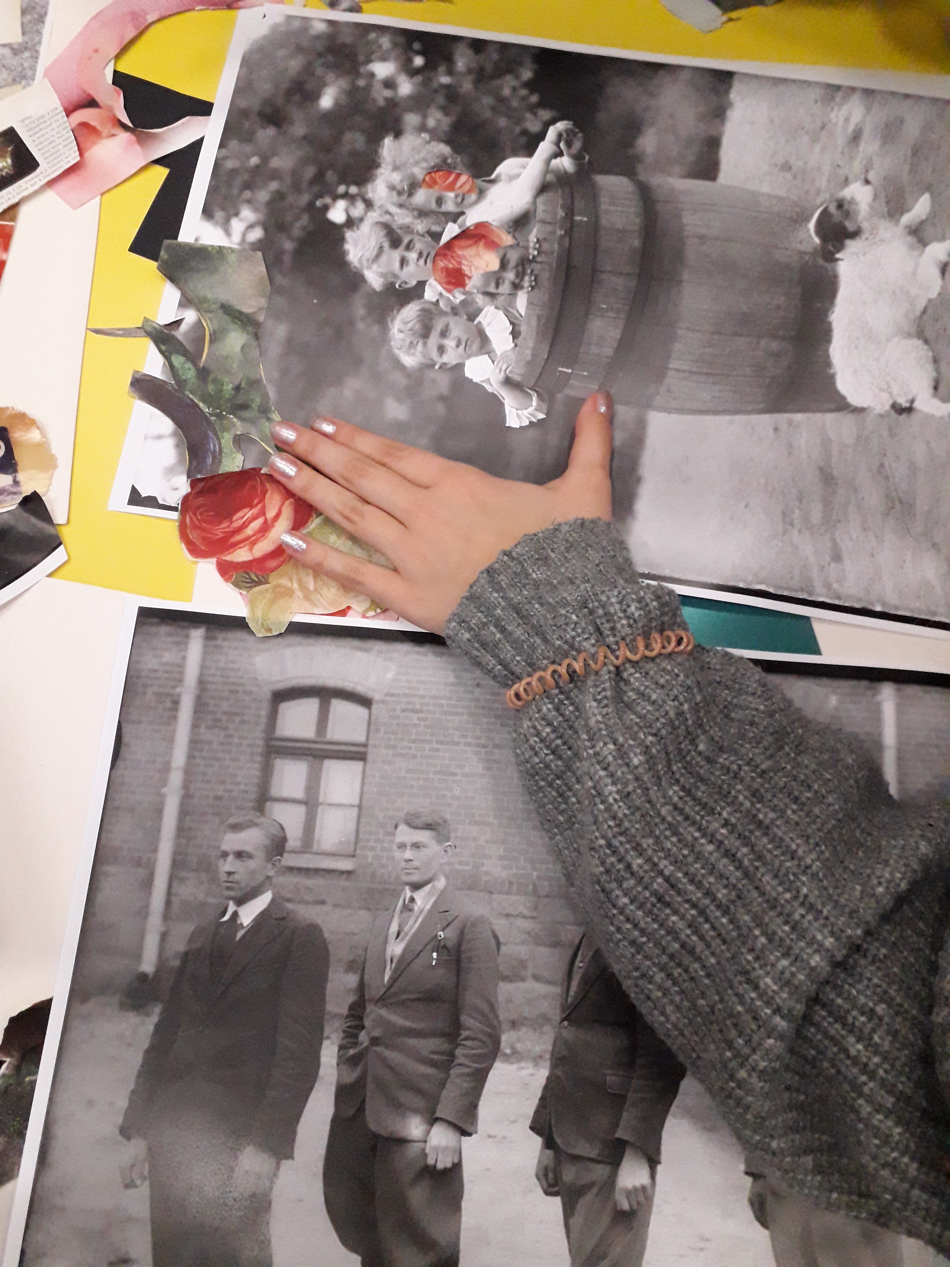 Efekty warsztatów "Kolaż:Publiczny" poprowadzonych przez artystkę Zuzannę Dolegę podczas obchodów Dnia Domeny Publicznej, organizowanych przez Centrum Cyfrowe w FINA Wałbrzyska 3/5 Warszawie w dniu 25 stycznia 2019 roku.